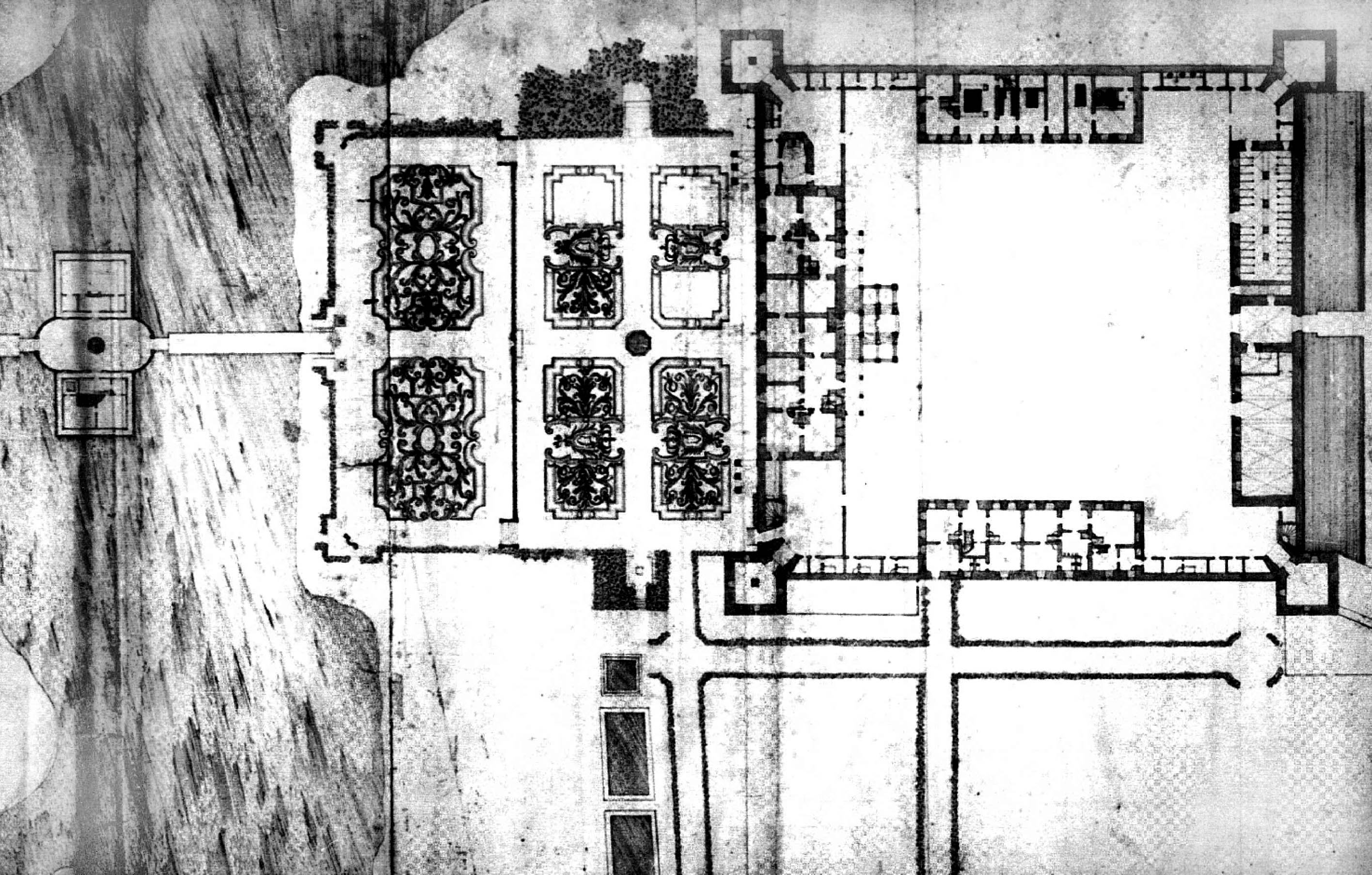 План Жовківського замку з парком. Архітектор Антоній Кастеллі (1740).